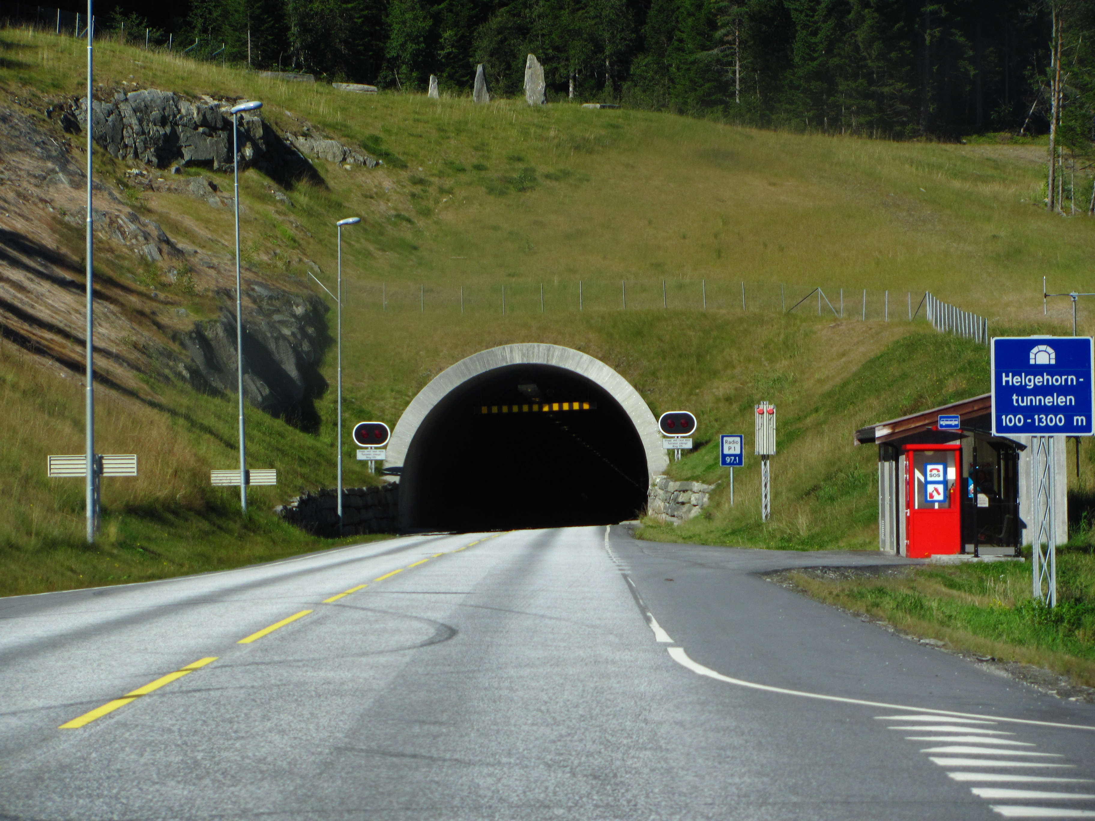 Helgehorntunnelen er ein 1160 meter lang veitunnel på fylkesvei 653 i Ørsta kommune i Møre og Romsdal.